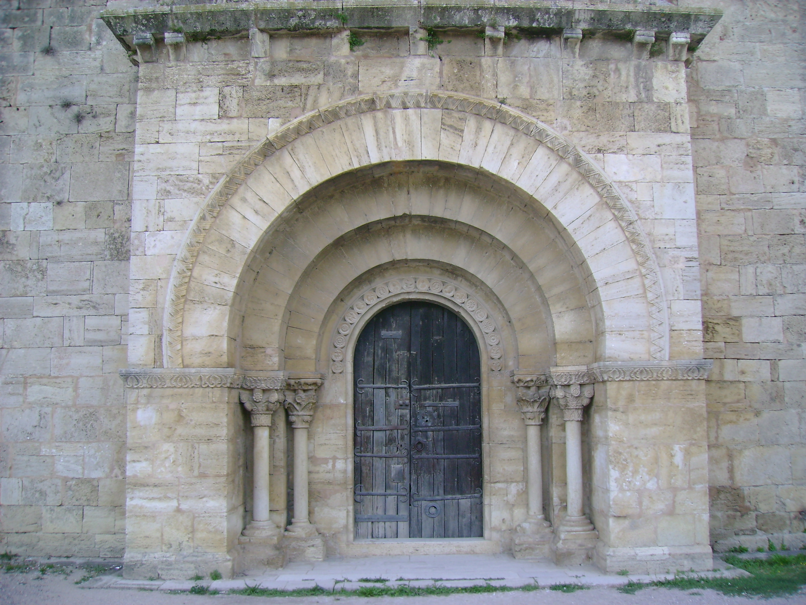 Portada de la Iglesia de Santa María de Porqueres (Bañolas, Gerona)